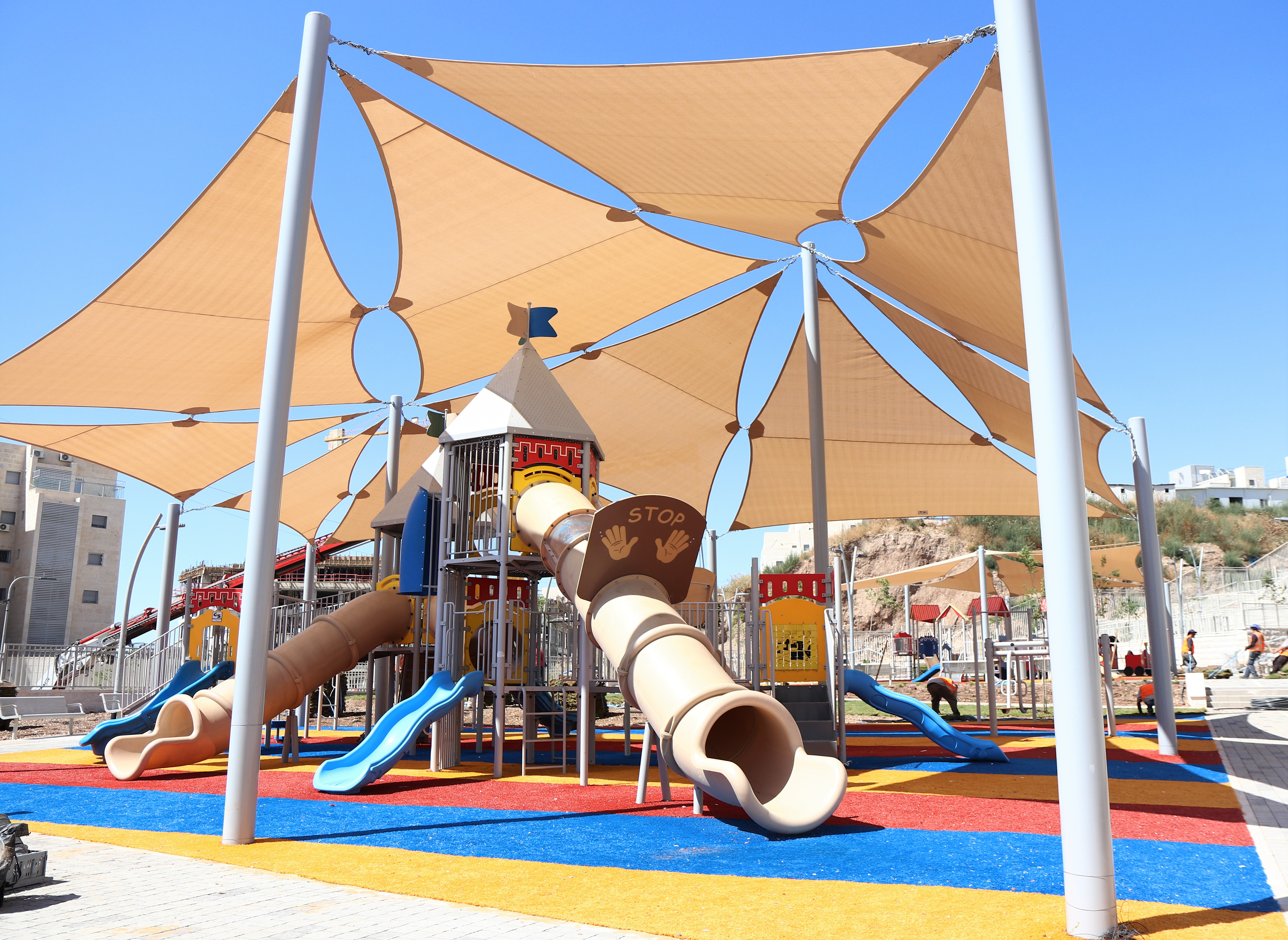 גן שעשועים עם הצללה בשכונה החדשה רמה ג'2 בבית שמש